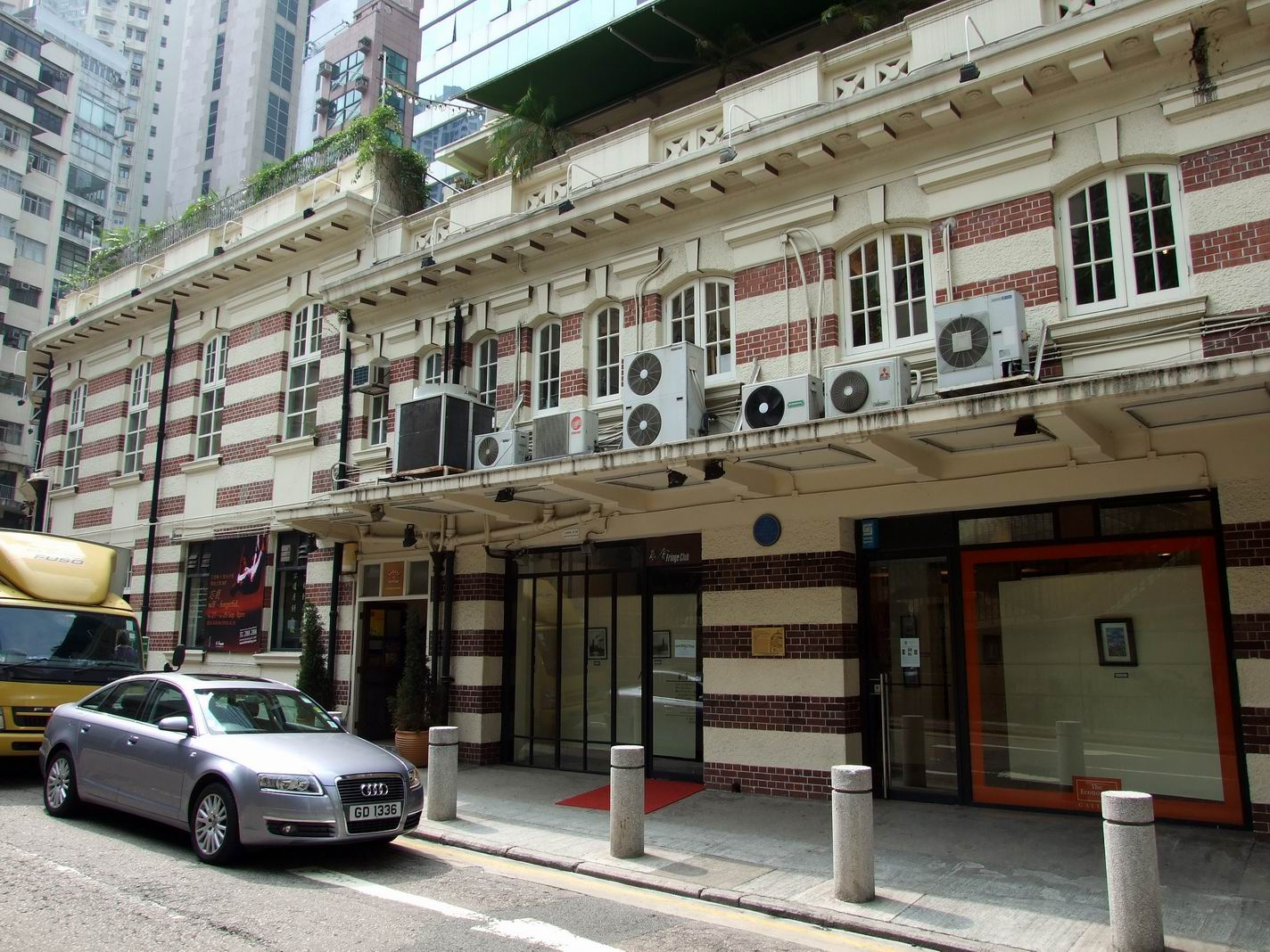 舊牛奶公司倉庫南座 (藝穗會)